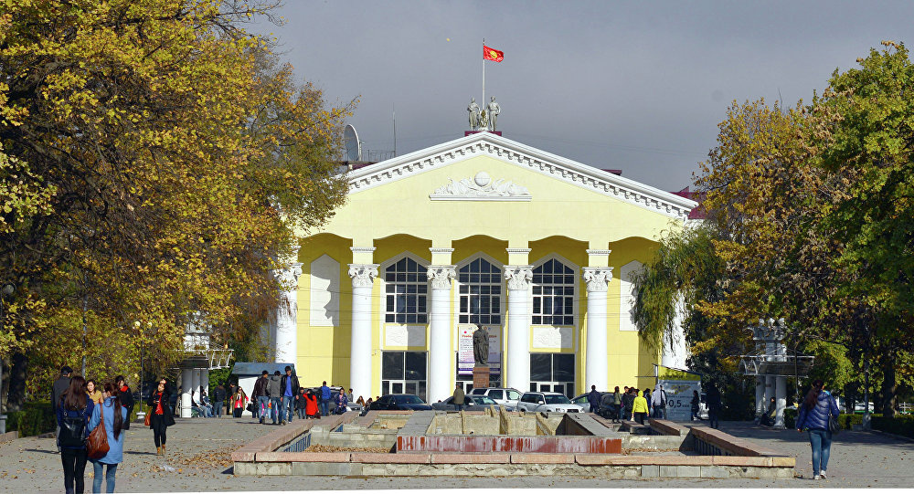 Главное здание Кыргызский национальный университет имени Жусупа Баласагына